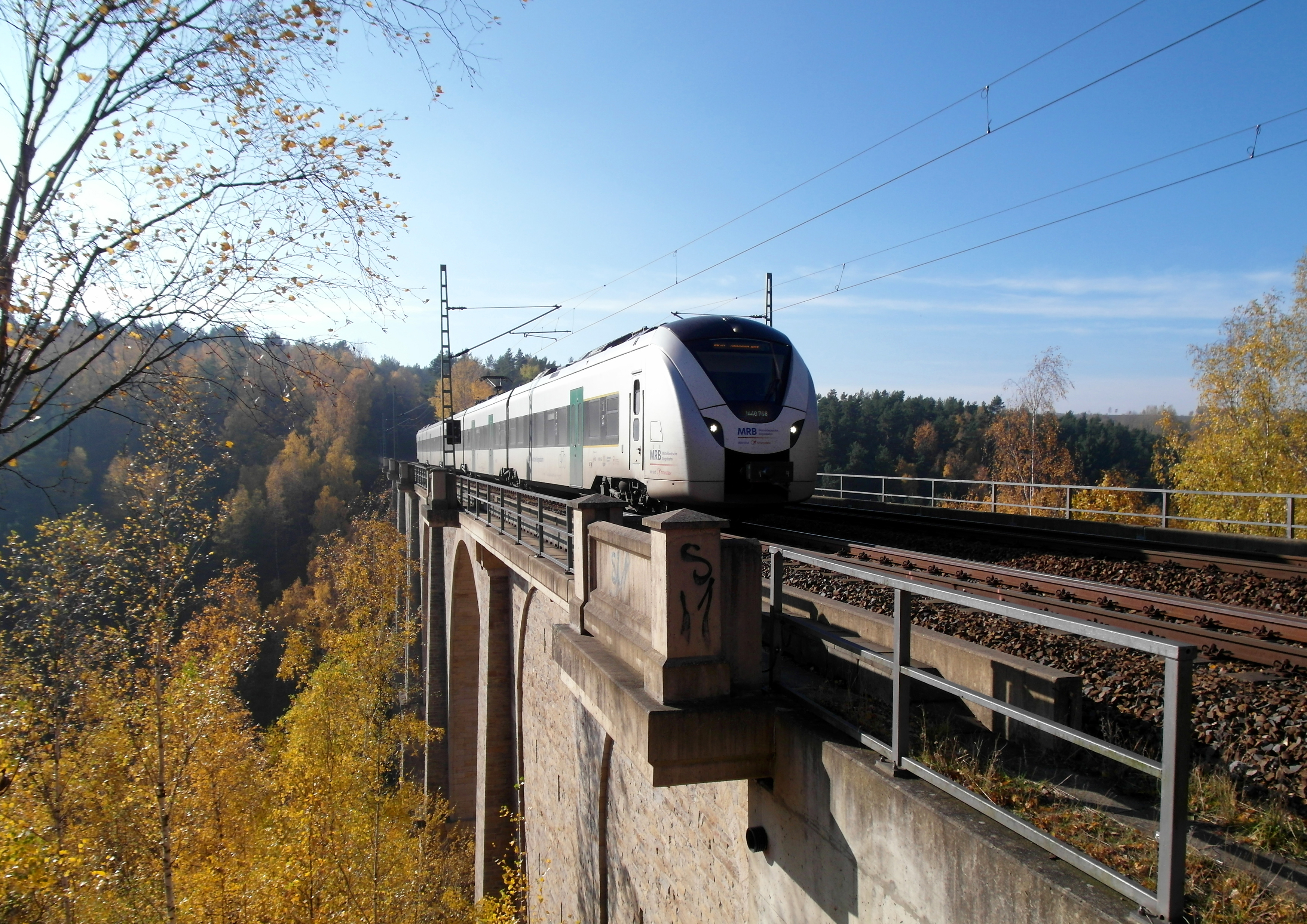 06.11.2018 09627 Hilbersdorf (Bobritzsch-Hilbersdorf), Muldenhütten: Blick von GMP: 550.900656,13.388691 nach Südwesten zum Eisenbahnviadukt Muldenhütten (GMP: 50.899941,13.387172). Ein Regionalzug Richtung Dresden überquert die Brücke. [SAM8607.JPG]20181106260DR.JPG(c)Blobelt